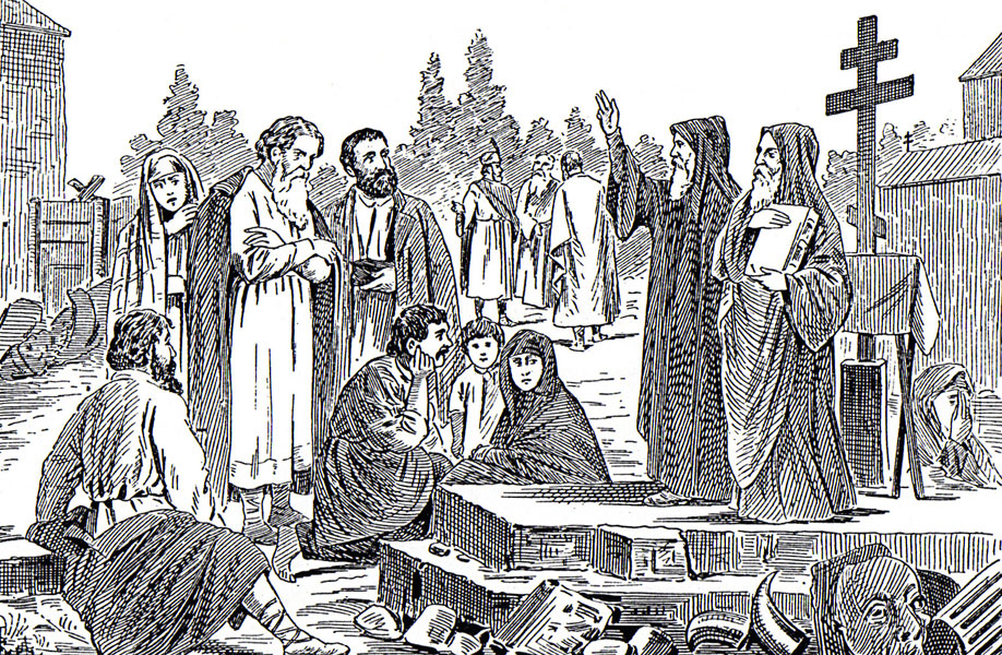 Српски (ћирилица): Срби примају Христову веру. цртеж. 19. век